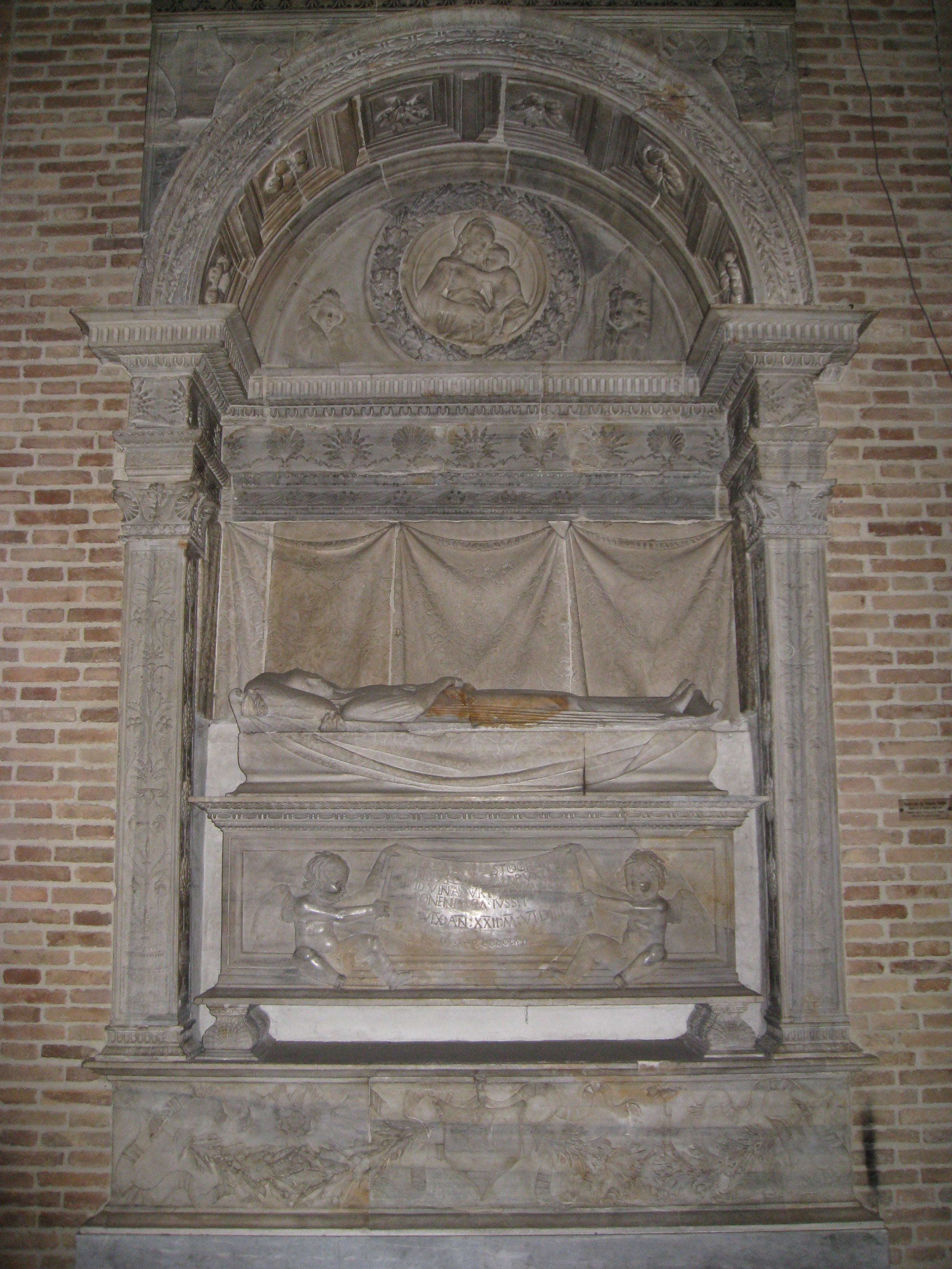 Forlì, Abbazia basilica di San Mercuriale: Sepolcro di Barbara Manfredi.